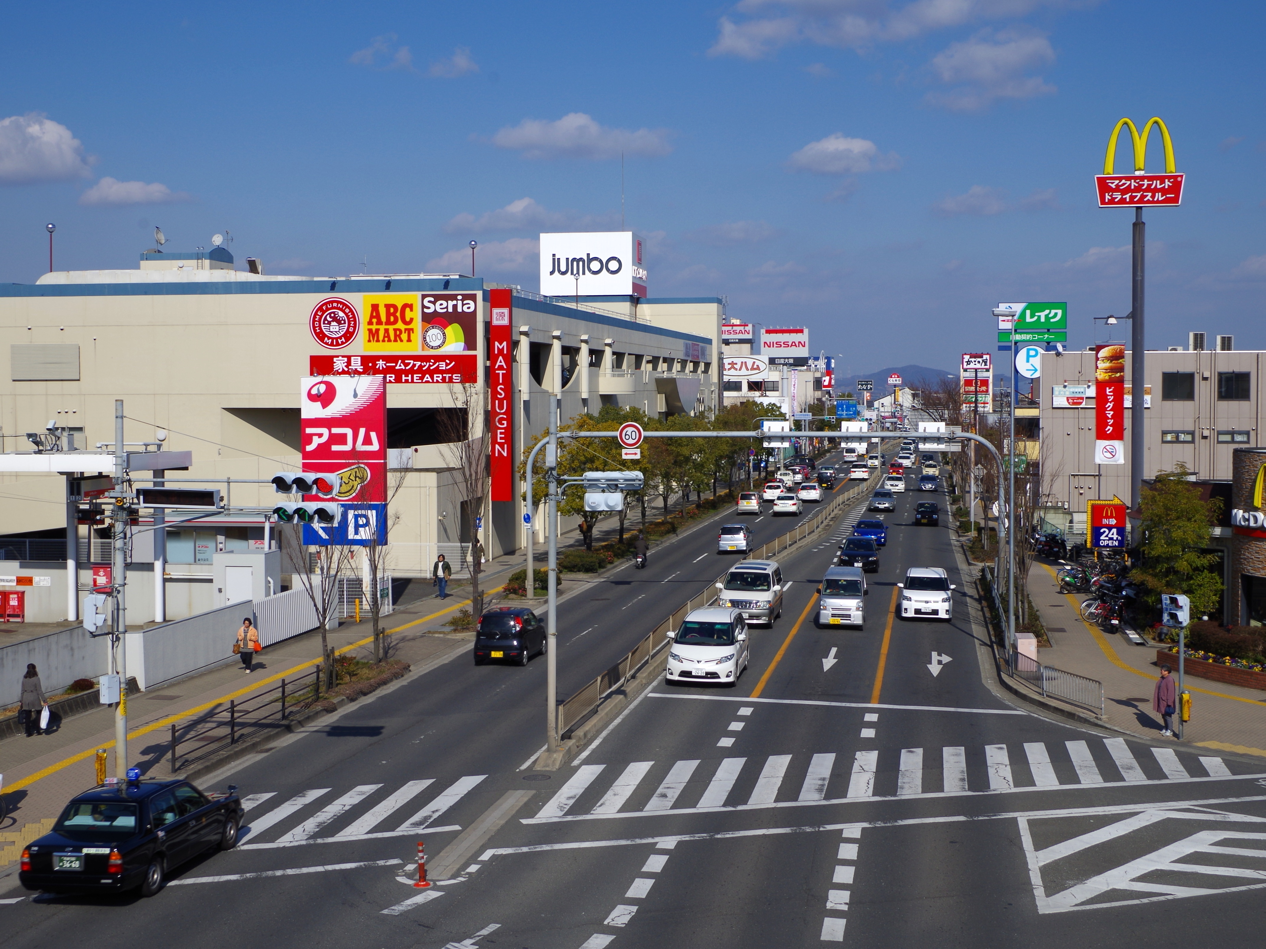 大阪外環状線(国道170号) 河内長野警察署前交差点にて 2013.2.10